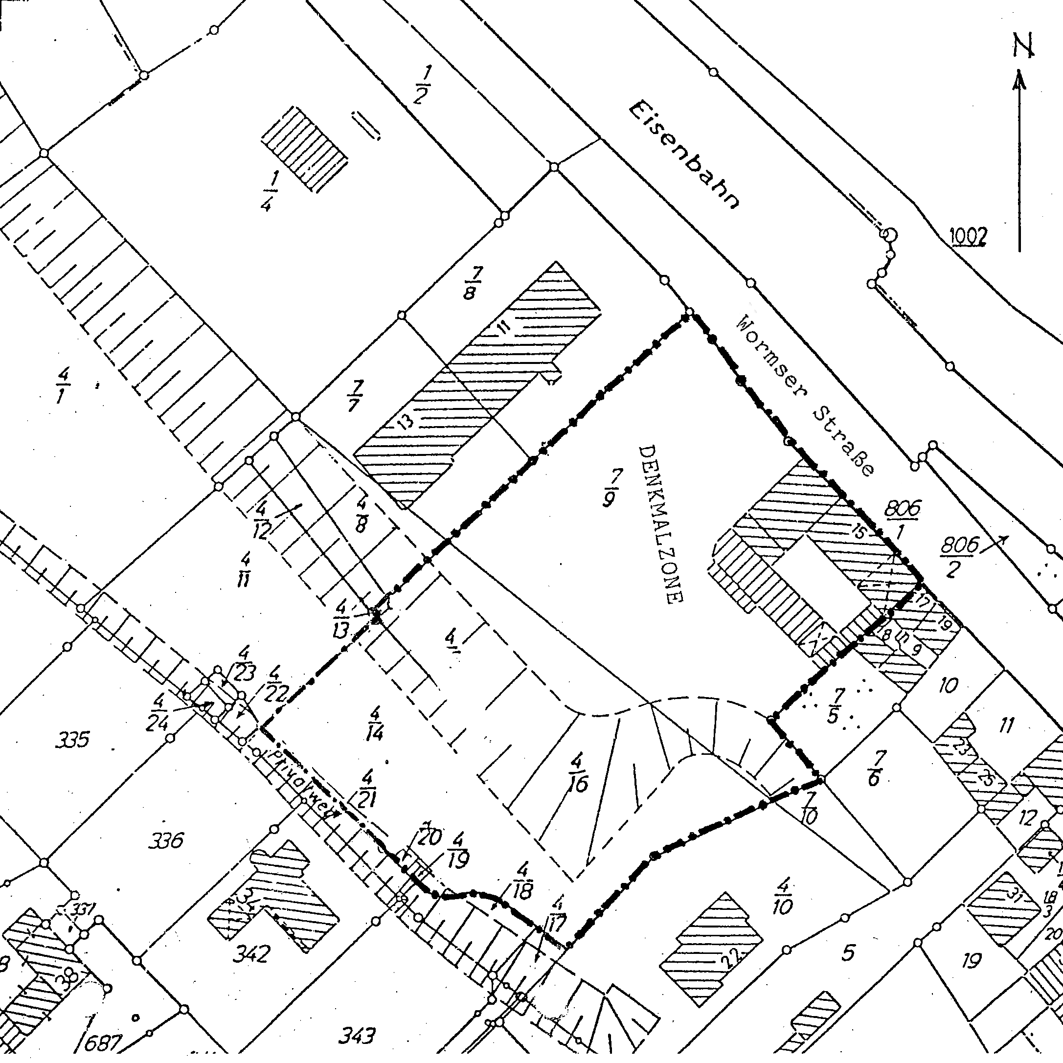 Lageplan Wormser Straße 15, Mainz, Stand Oktober 1987